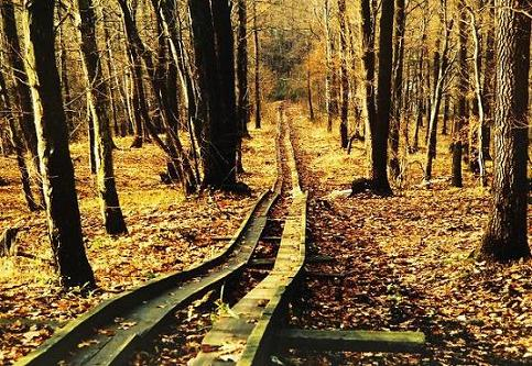 Kolej linowo-terenowa Spicak Czechy